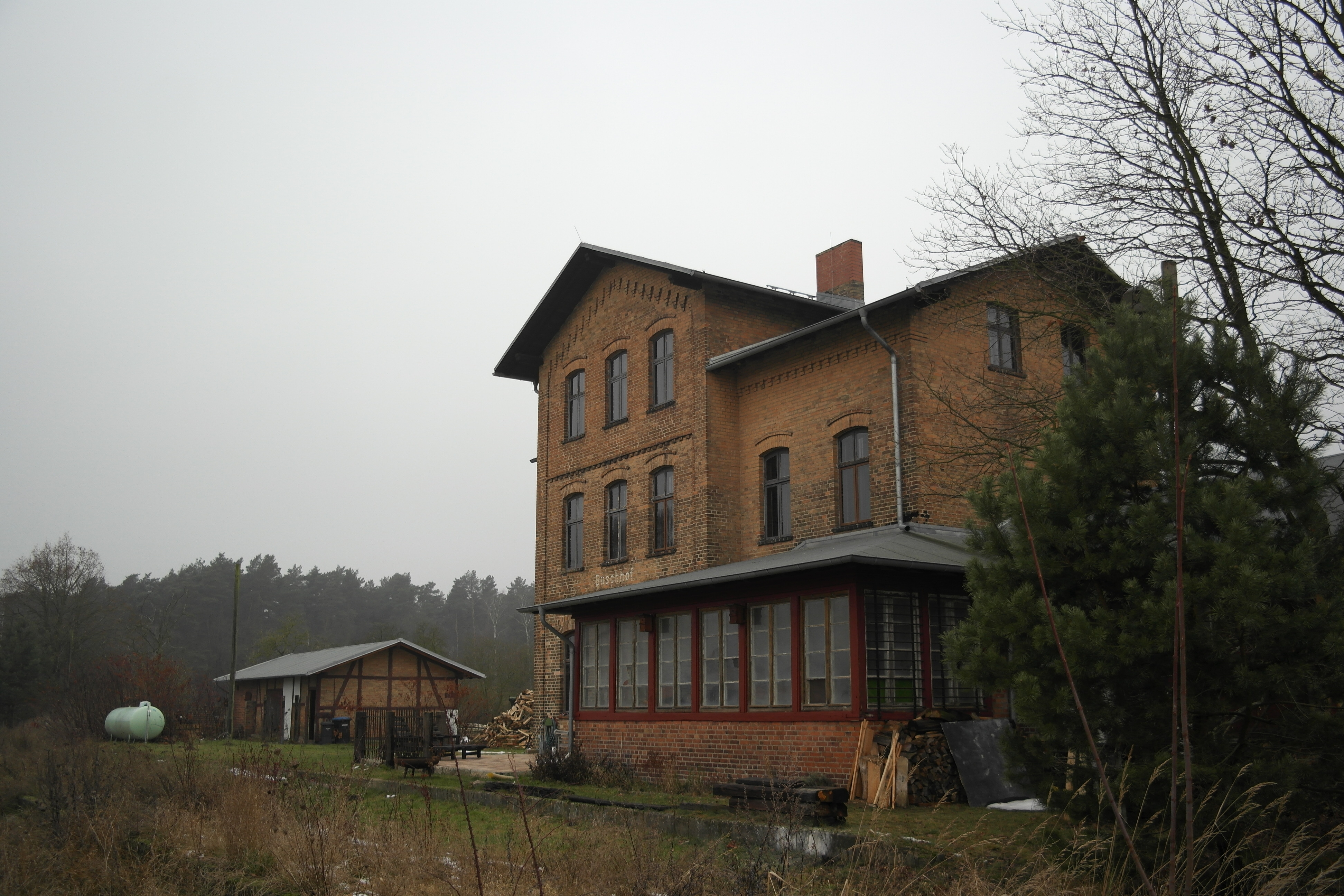 Bahnhof Buschhof, Blick von Südosten